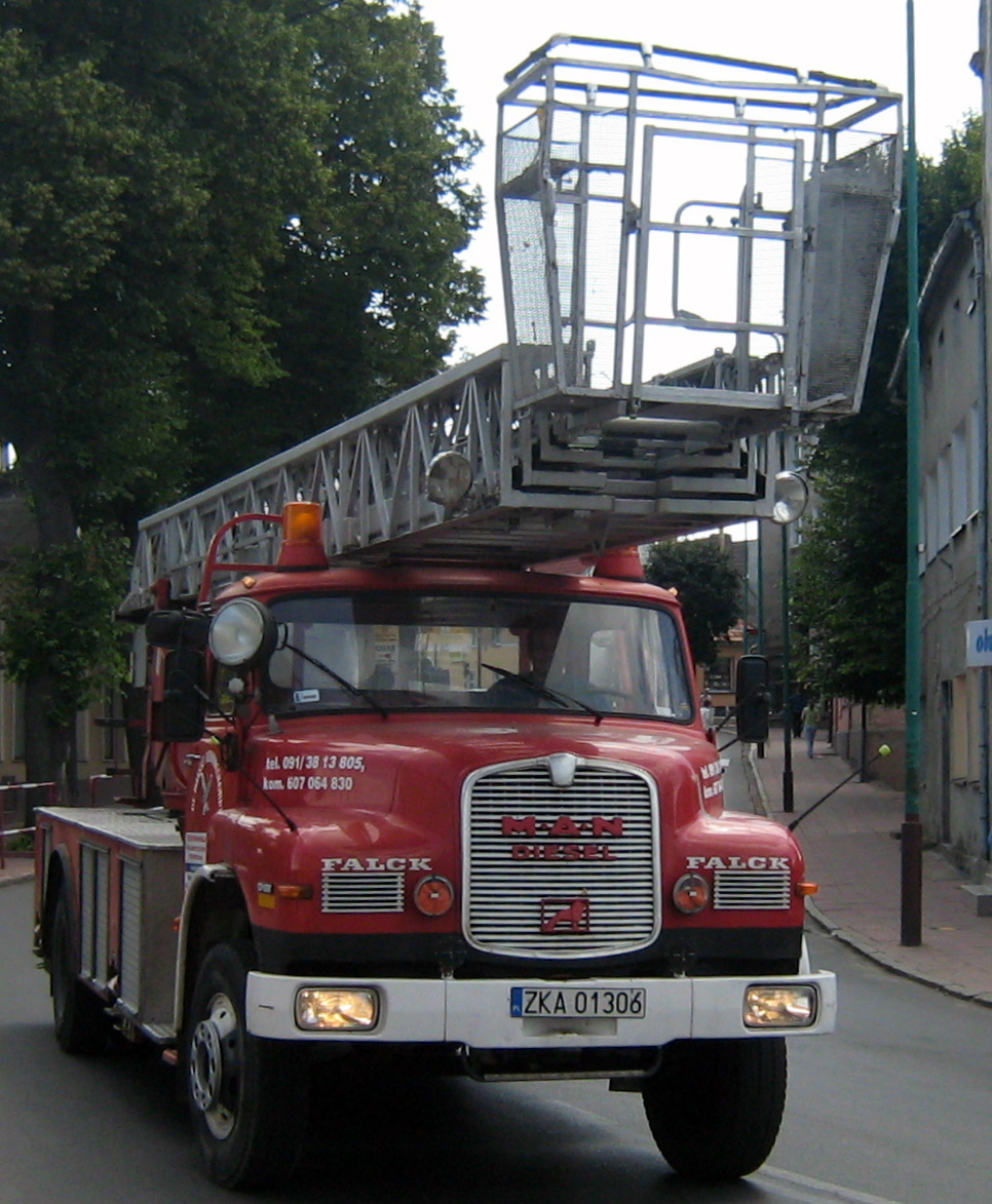 MAN Diesel Falck z drabiną w Wolinie.